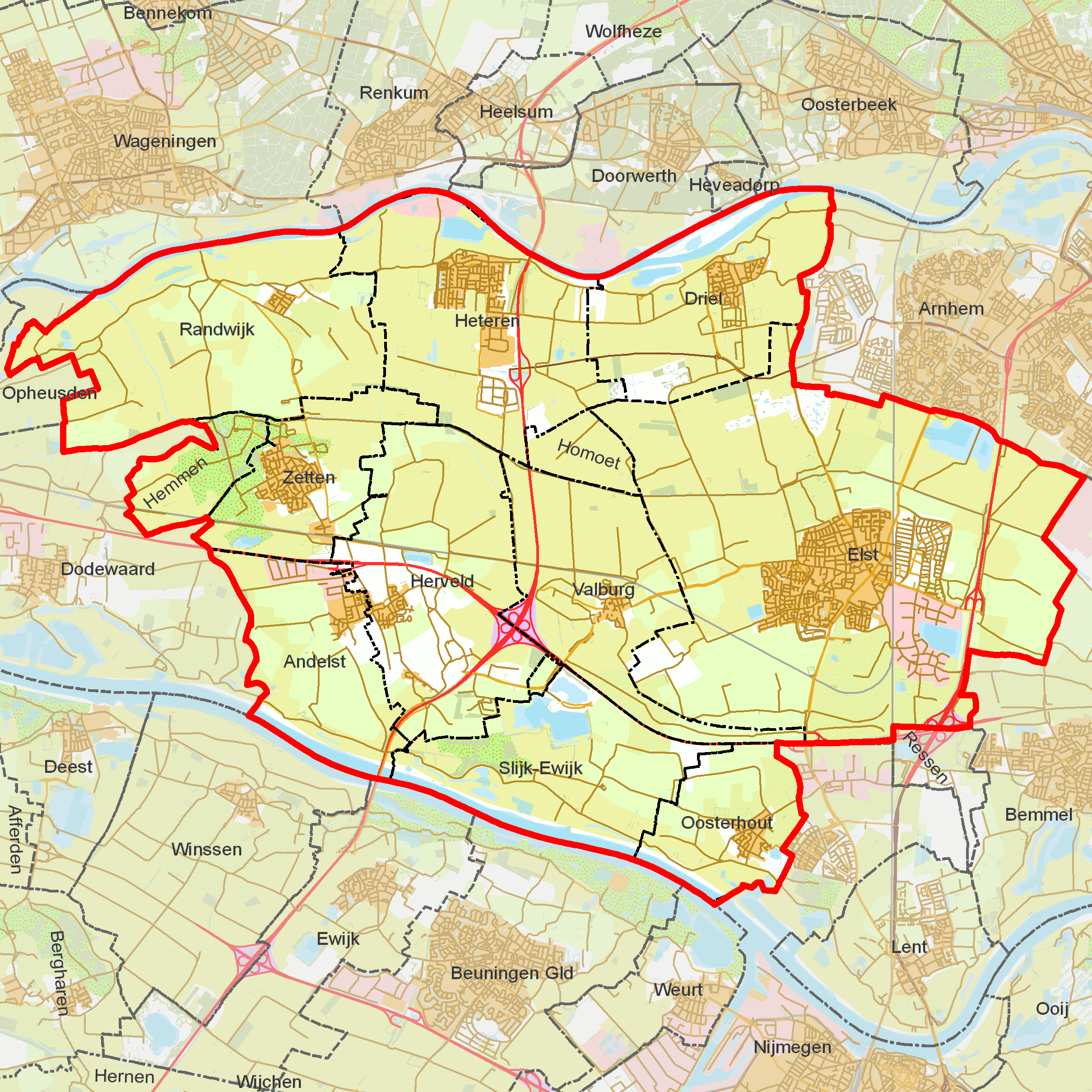 BAG woonplaatsen - Gemeente Overbetuwe.png